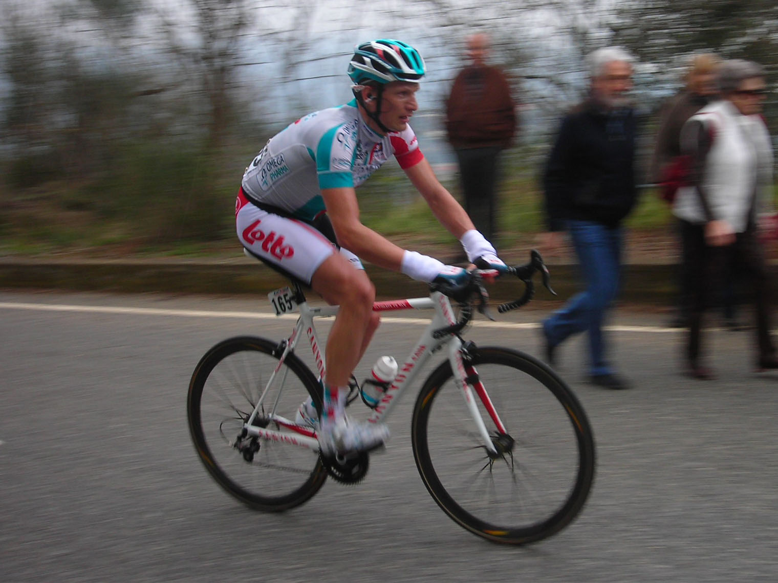 Sebastian Lang sulle Manie alla Milano-Sanremo 2011